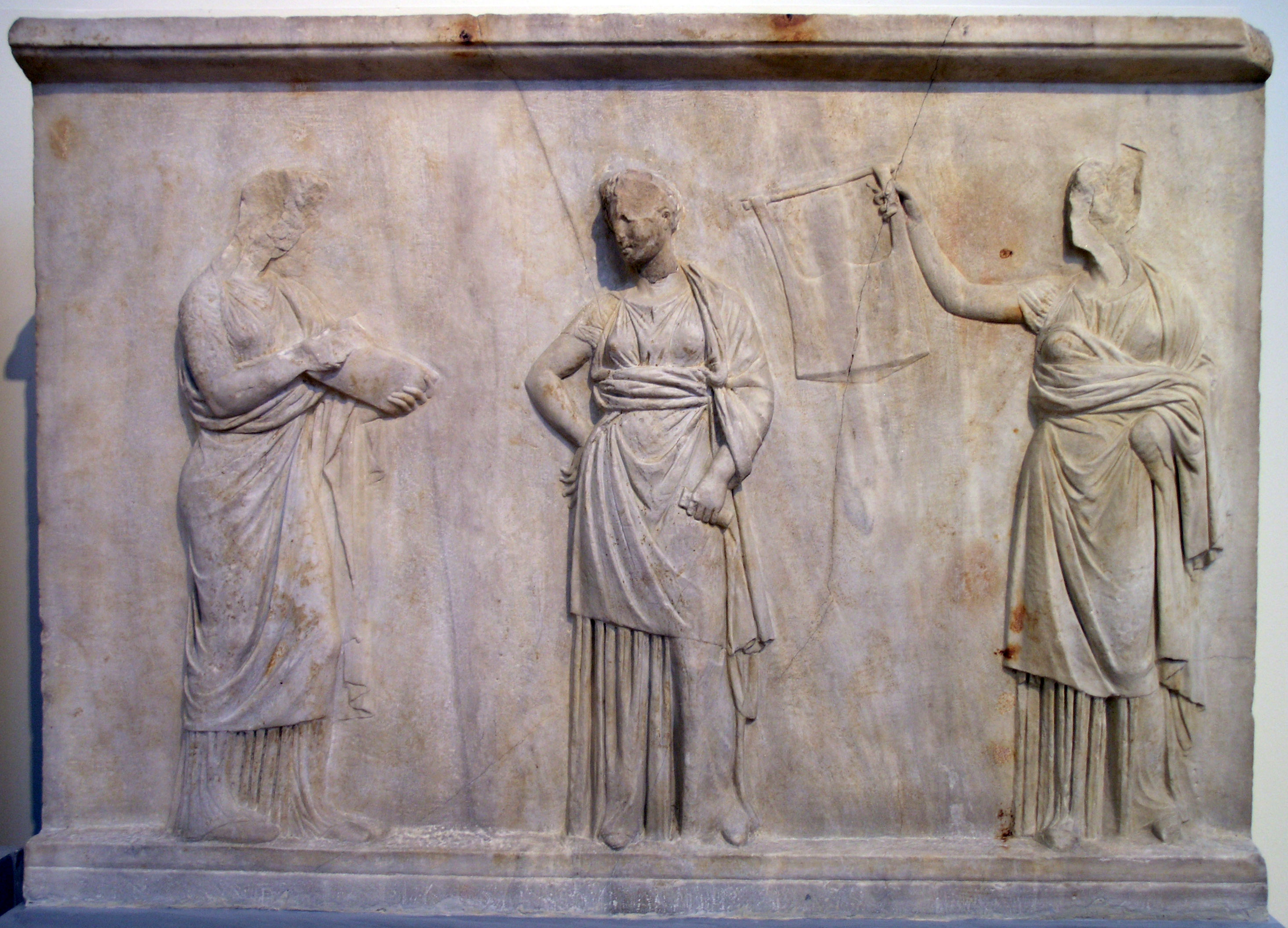 Bas-relief d'un piédestal, en marbre, provenant de Mantinée en Arcadie. Il s'agissait du décor de la base d'un groupe statuaire de la trinité délienne Léto, Apollon et Artémis, ou d'un autel. La plaque présente trois des neuf muses tenant des instruments de musique et des rouleaux de parchemins. Les reliefs sont de style praxitélien et sont probablement l'œuvre d'un disciple du grand sculpteur. Milieu du IVe s. av. J.-C. Musée archéologique national, Athènes.